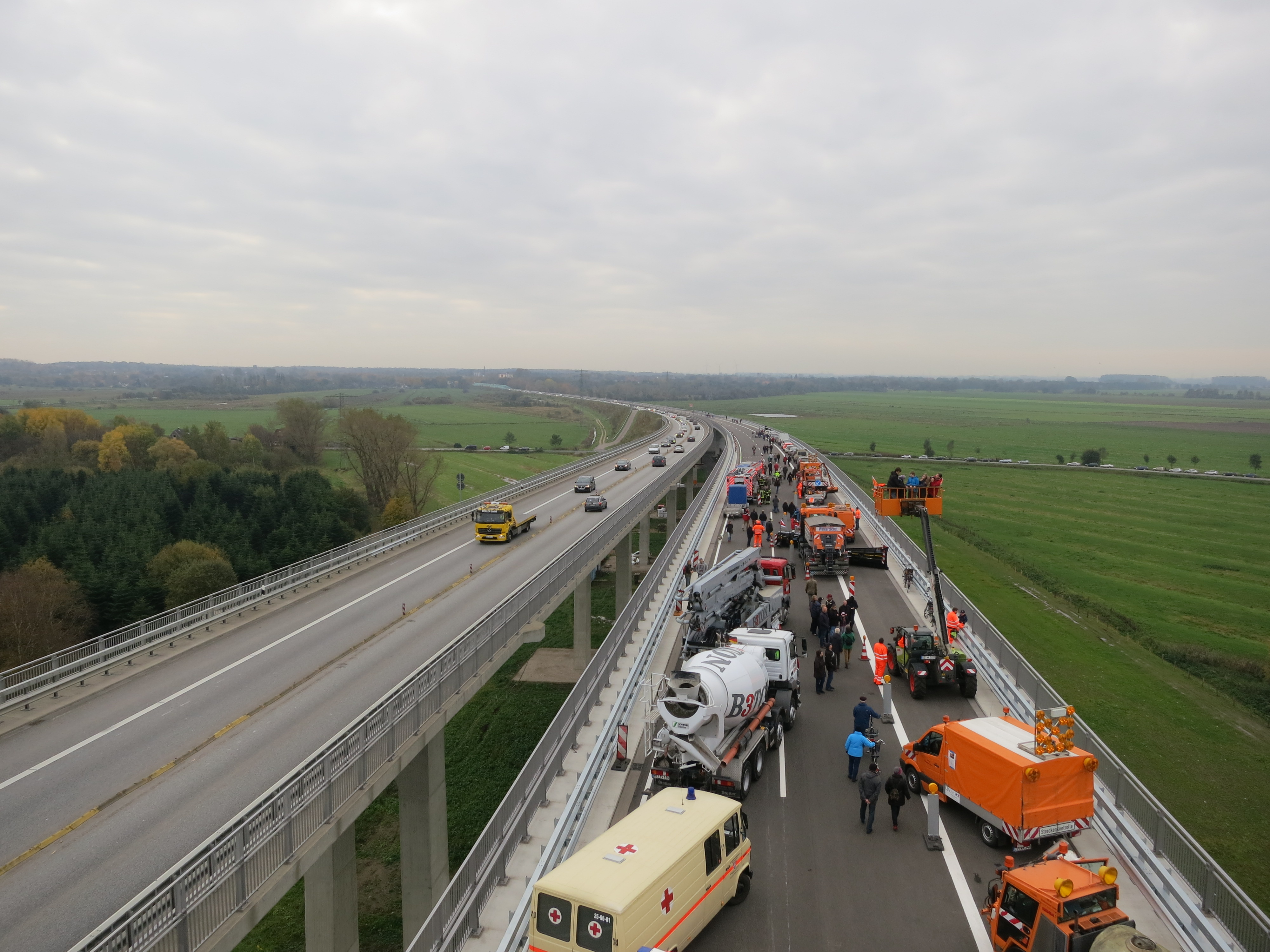 Eröffnung der westlichen Störbrücke der A23 bei Itzehoe